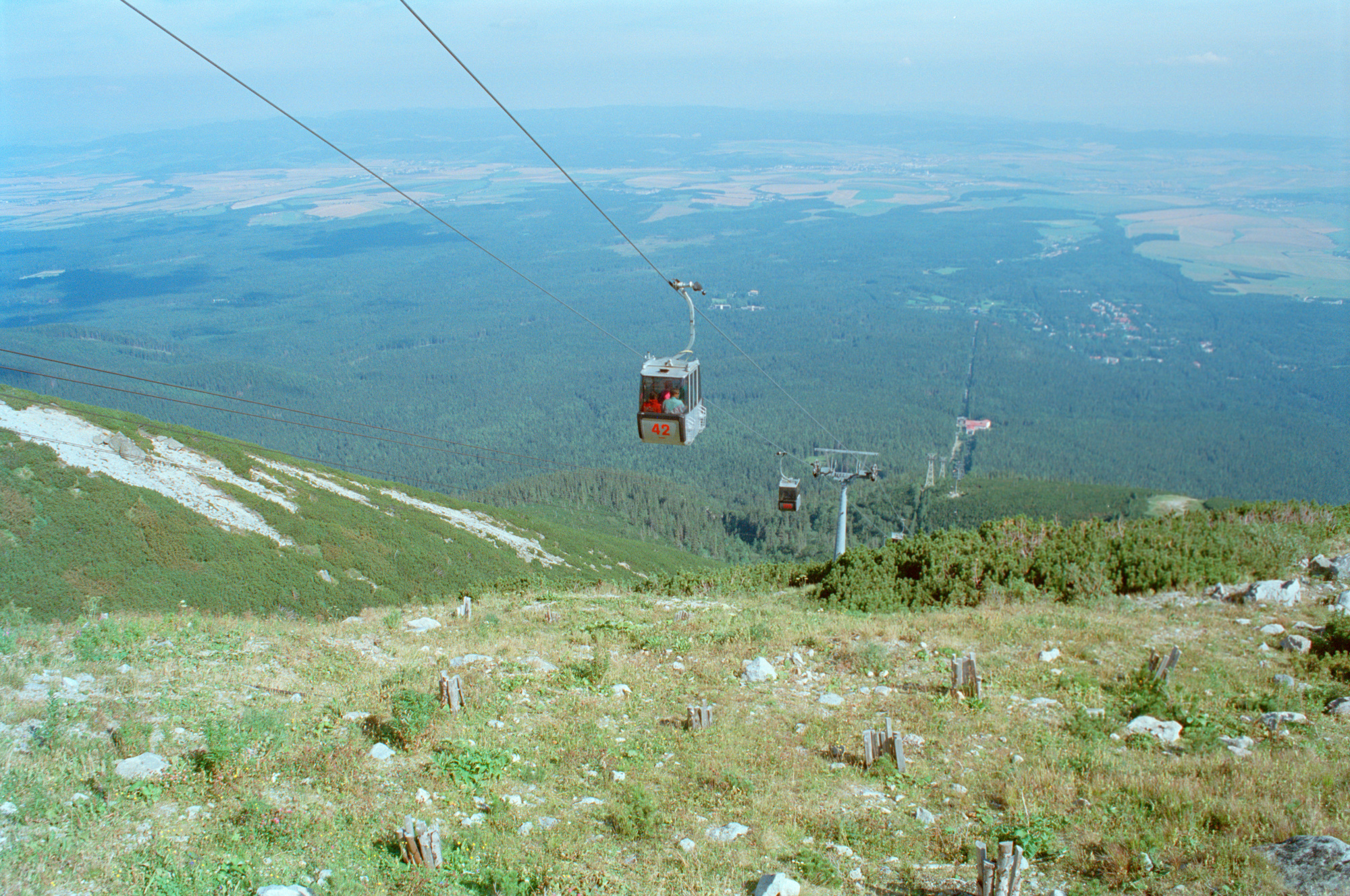 Lomnický štít/Lanovka na Skalnaté pleso own picture, taken in summer 2000